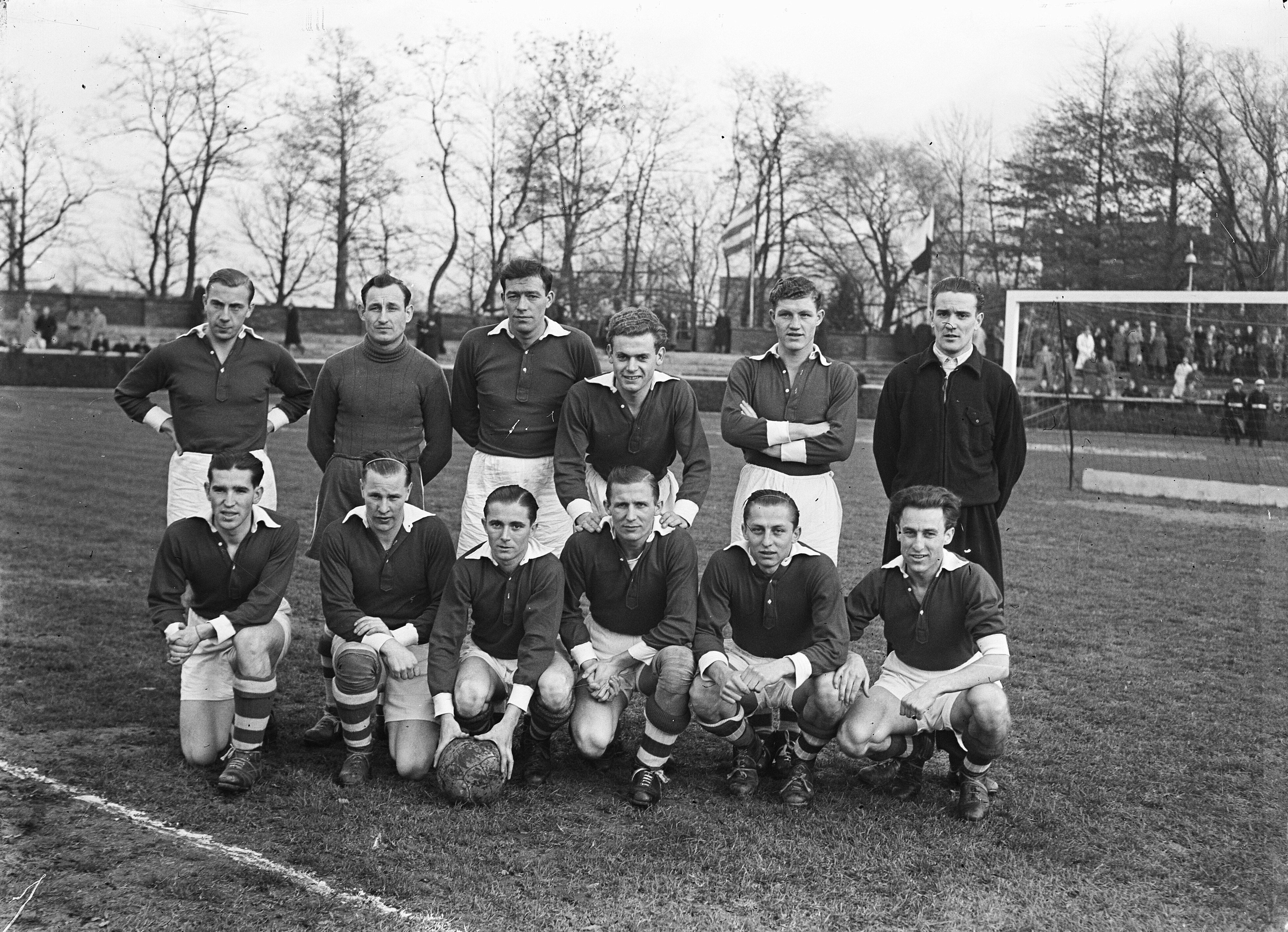 Collectie / Archief : Fotocollectie Anefo Reportage / Serie : [ onbekend ] Beschrijving : PSV tegen SC Emma 1-1. Elftal SC Emma Datum : 28 november 1947 Locatie : Eindhoven Trefwoorden : elftallen, groepsportretten, sport, voetbal Fotograaf : Sagers, Harry / Anefo Auteursrechthebbende : Nationaal Archief Materiaalsoort : Glasnegatief Nummer archiefinventaris : bekijk toegang 2.24.01.09 Bestanddeelnummer : 902-4791